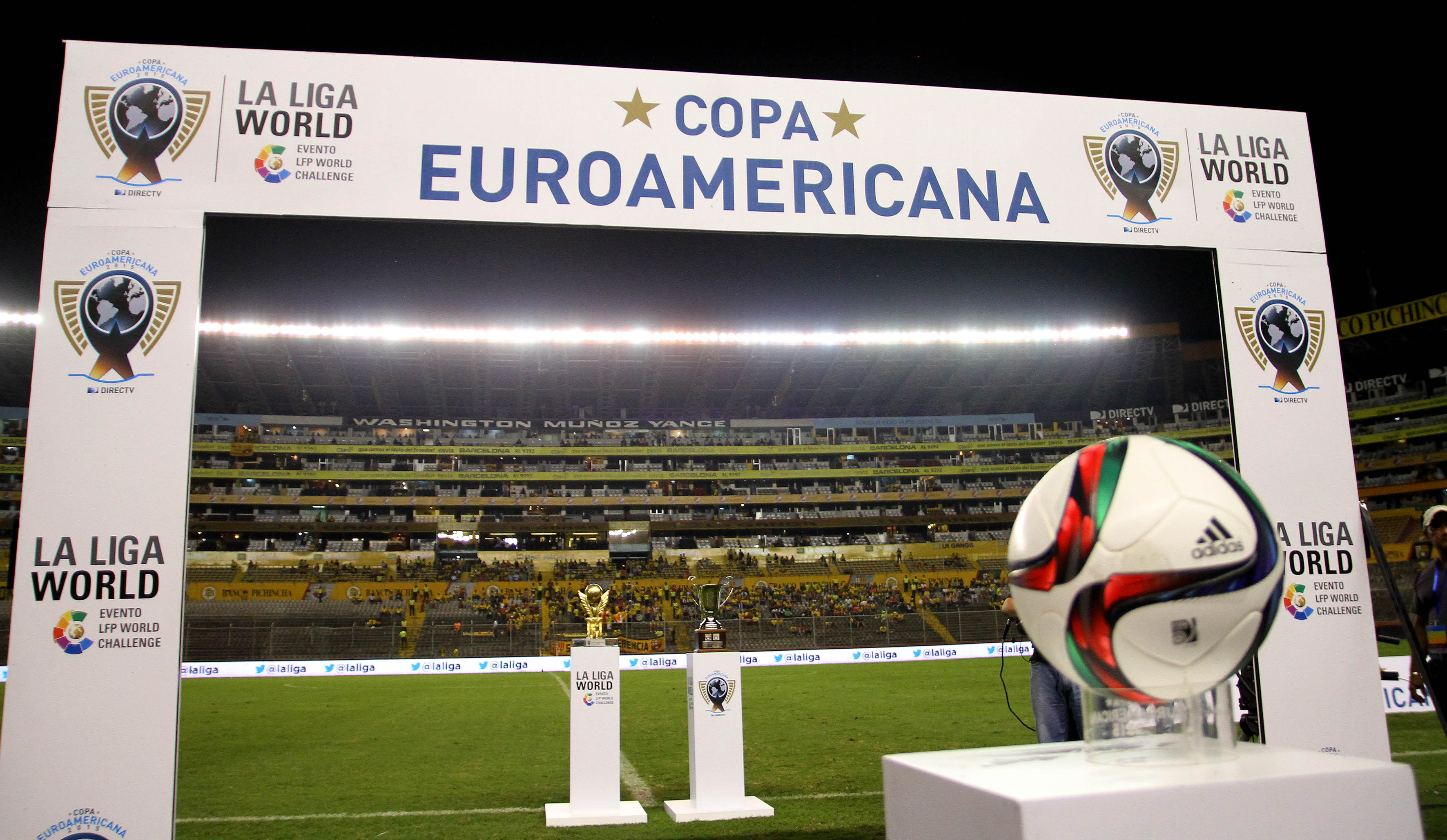 Guayaquil, 28 de may (Andes).-El estadio Monumental es el escenario donde se disputa el partido entre Barcelona de Ecuador y el Spanyol por la Copa Euromericana Foto: César Muñoz/Andes